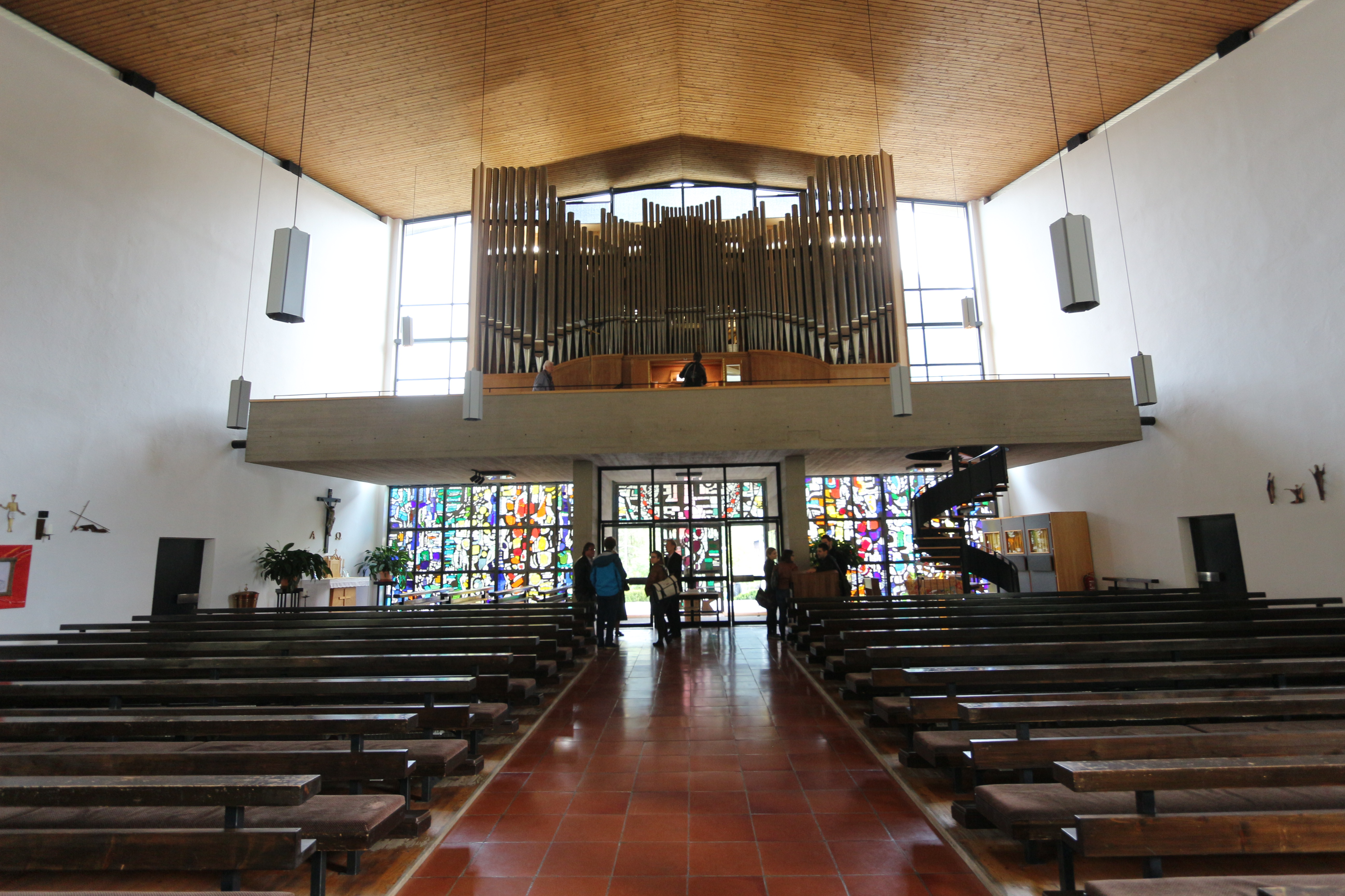 Seit 2016 befindet sich Walker-Orgel op 3340 (der ehemaligen Innsbrucker Stadtsaälen) in der Pfarrkirche Ötztal-Bahnhof. Dieses Bild wurde anlässlich des österreichischen Tags des Denkmals 2017 in Tirol eingereicht. Diese Datei wurde im Rahmen von WikiDaheim 2017 in Österreich erstellt und hochgeladen.Sie wurde dem Themenbereich Denkmalschutz zugeordnet.